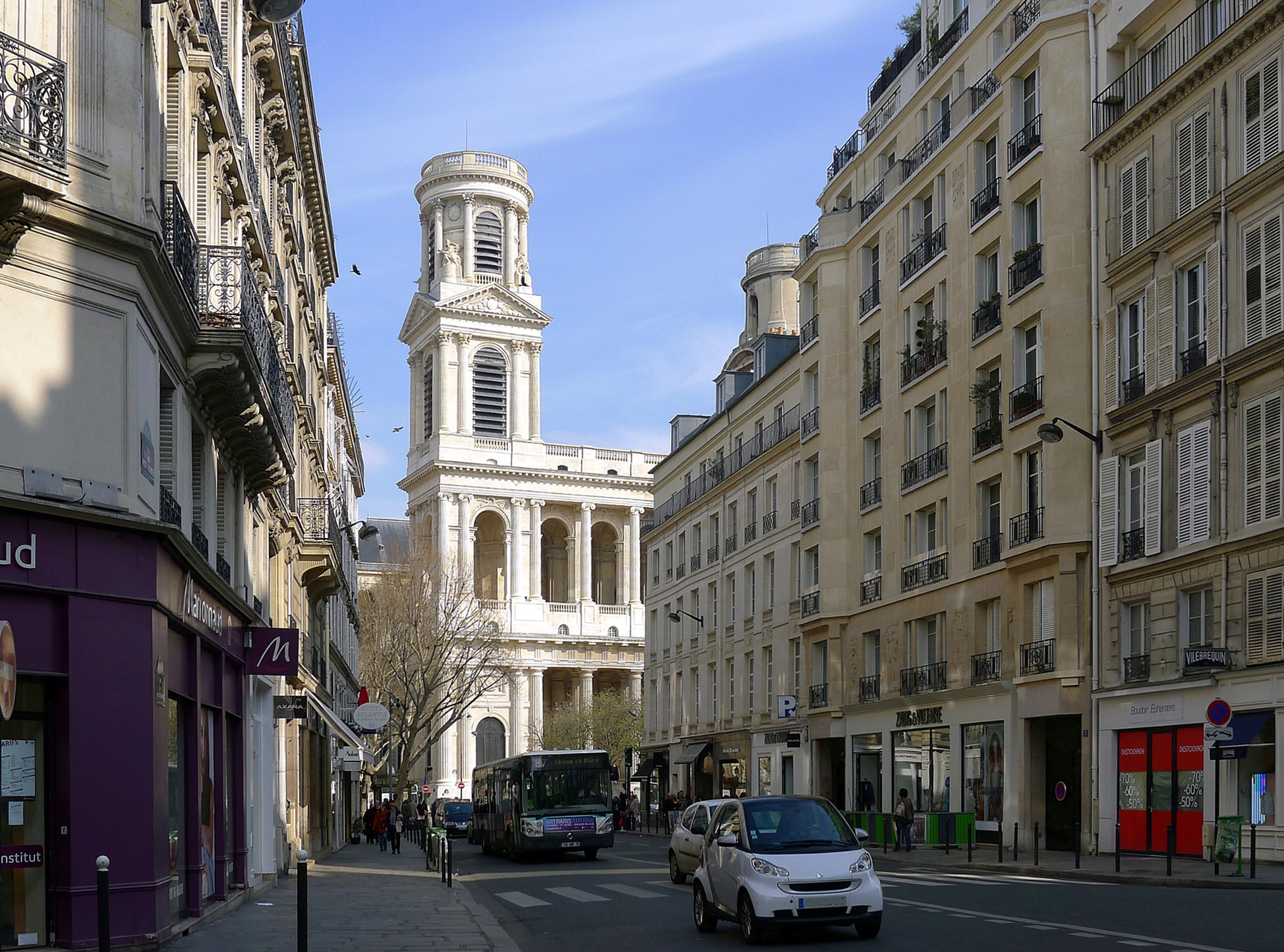 Rue du Vieux-Colombier - Paris VI